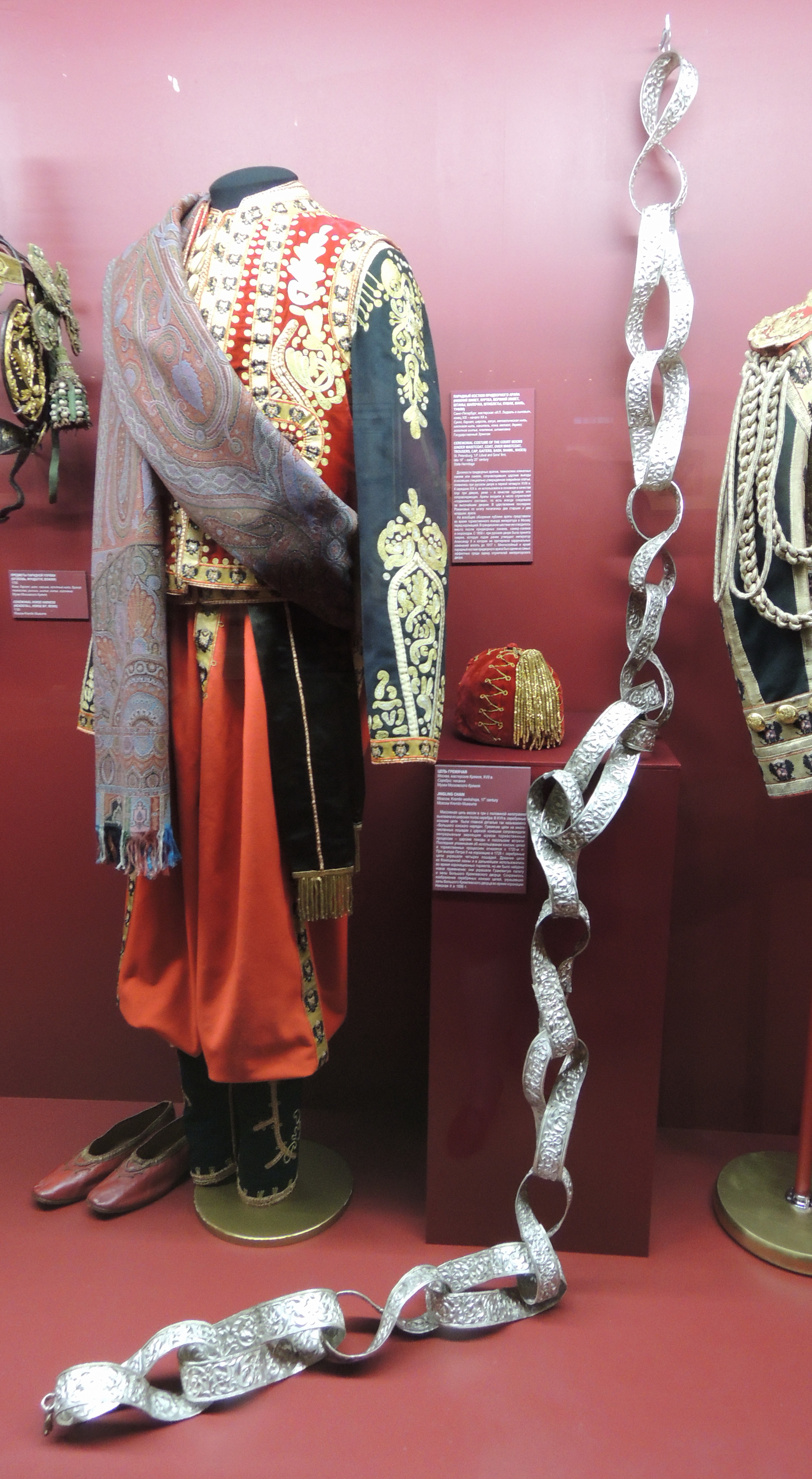 Парадный костюм придворного арапа (нижний жилет, куртка, верхний жилет, штаны, шапочка, штиблеты, кушак, шаль, туфли. СПб, мастерская "И.П. Лидваль и сыновья", к. 19 - нач. 20 в. Сукно, бархат, шерсть, галун, металлическая нить, шелковая нить, канитель, кожа, металл, дерево; золотное шитье, плетение, штамповка. Государственный Эрмитаж Цепь гремячая. Москва, мастерские Кремля. 17 век. Серебро. ММК, Массивная цепь весом в 3,5 кг, выкованная из широких полос серебра. На 15 звеньях тщательно проработан чеканный узор из переплетающихся побегов, цветов, ягод и трилистников. Входили в 17 в. в число символов власти, являясь главной деталью т.н. "Большого конского наряда". Сопровождали непрерывным шумом торжественные процессии - царские походы и посольские встречи. К концу 17 в. в царской Конюшенной казне насчитывалось до сотни таких цепей, из которых более 80 находятся в собрании Оружейной палаты. Последние упоминания об использовании конских цепей в торжественных процессиях относятся в 1720-х гг. При въезде Петра II на коронацию 1728 г. они украшали 4 лошадей. Древнейшие цепи из Конюшенной казны и в дальнейшем использовались во время коронационных торжеств, однако в новом применении - они украшали Грановитую палату и залы Большого Кремлевского дворца.